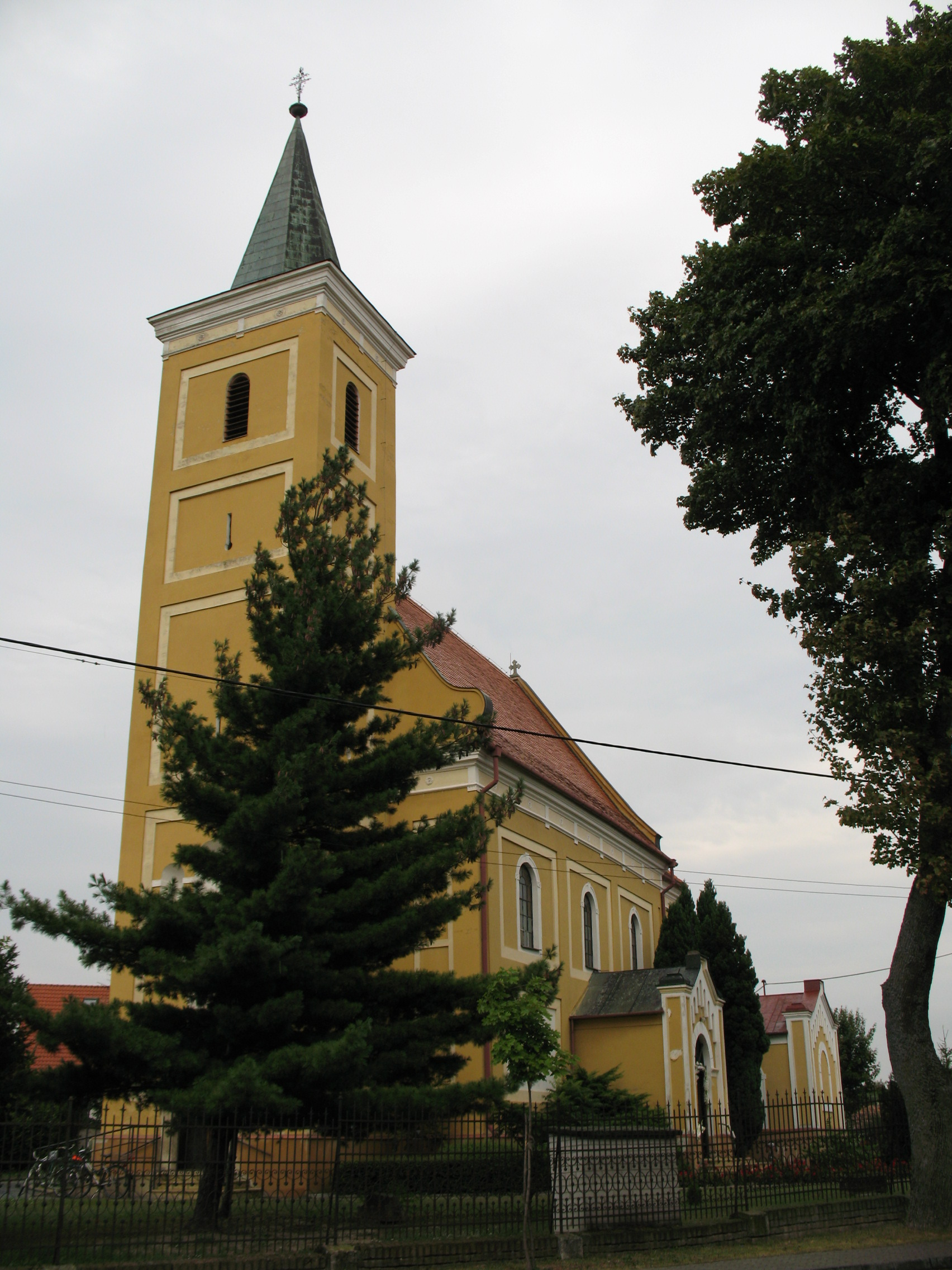 templom